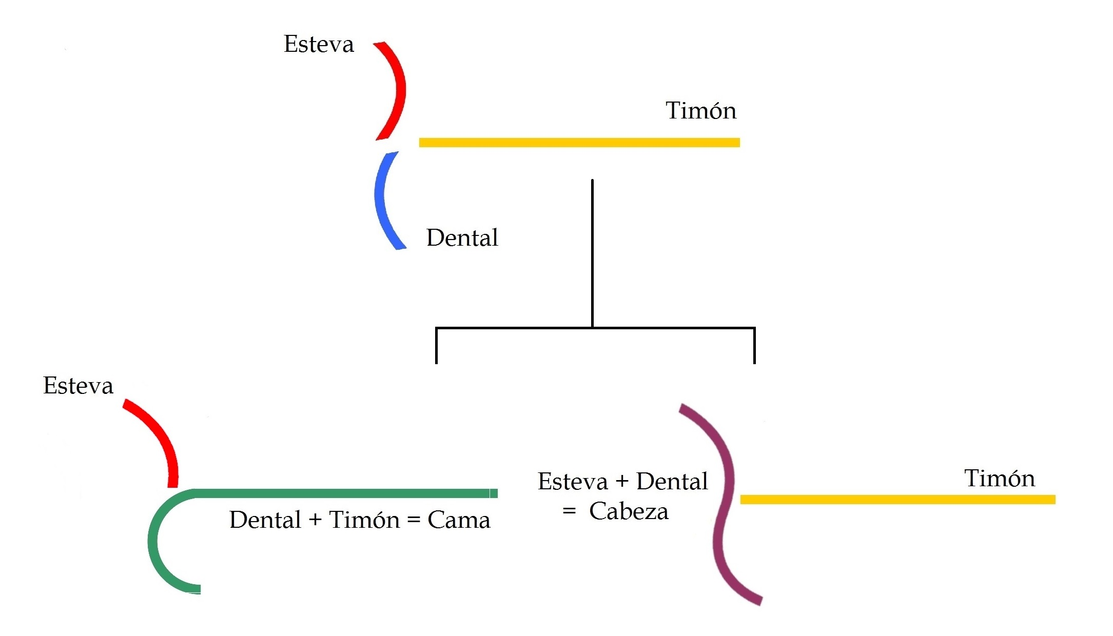 Elementos y composicion del arado parts and plough comosition, ard, charrue, araire